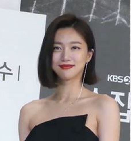 27일 오후 서울 영등포구 영등포동 타임스퀘어 아모리스홀에서 KBS 2TV 일일드라마 '왼손잡이 아내' 제작발표회가 열렸다. 이날 제작발표회에는 하연주, 이수경, 진태현, 김진우, 이승연이 참석했다.